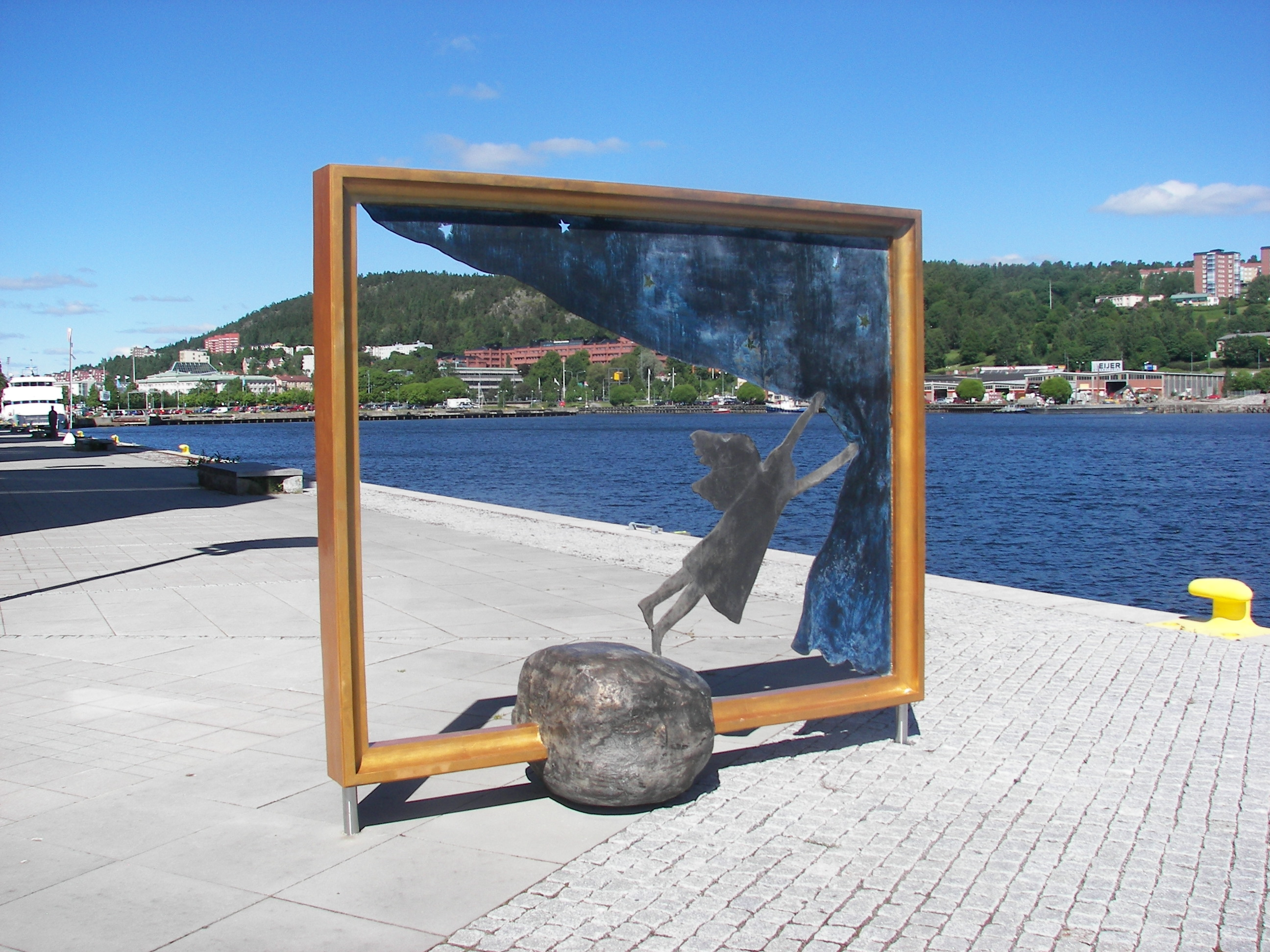 Gryning av Linnéa Jörpeland i Inre hamnen, Sundsvall